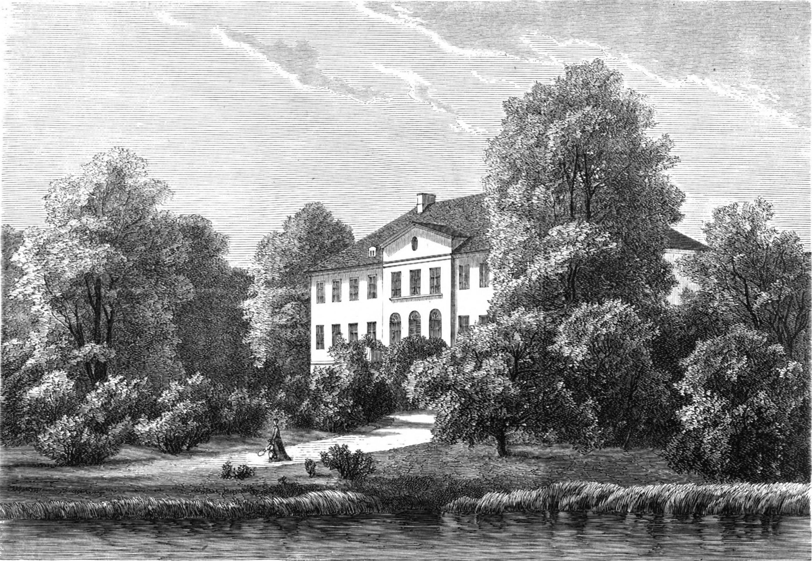 Herrgården Aggersvold i Holbæk, Danmark.